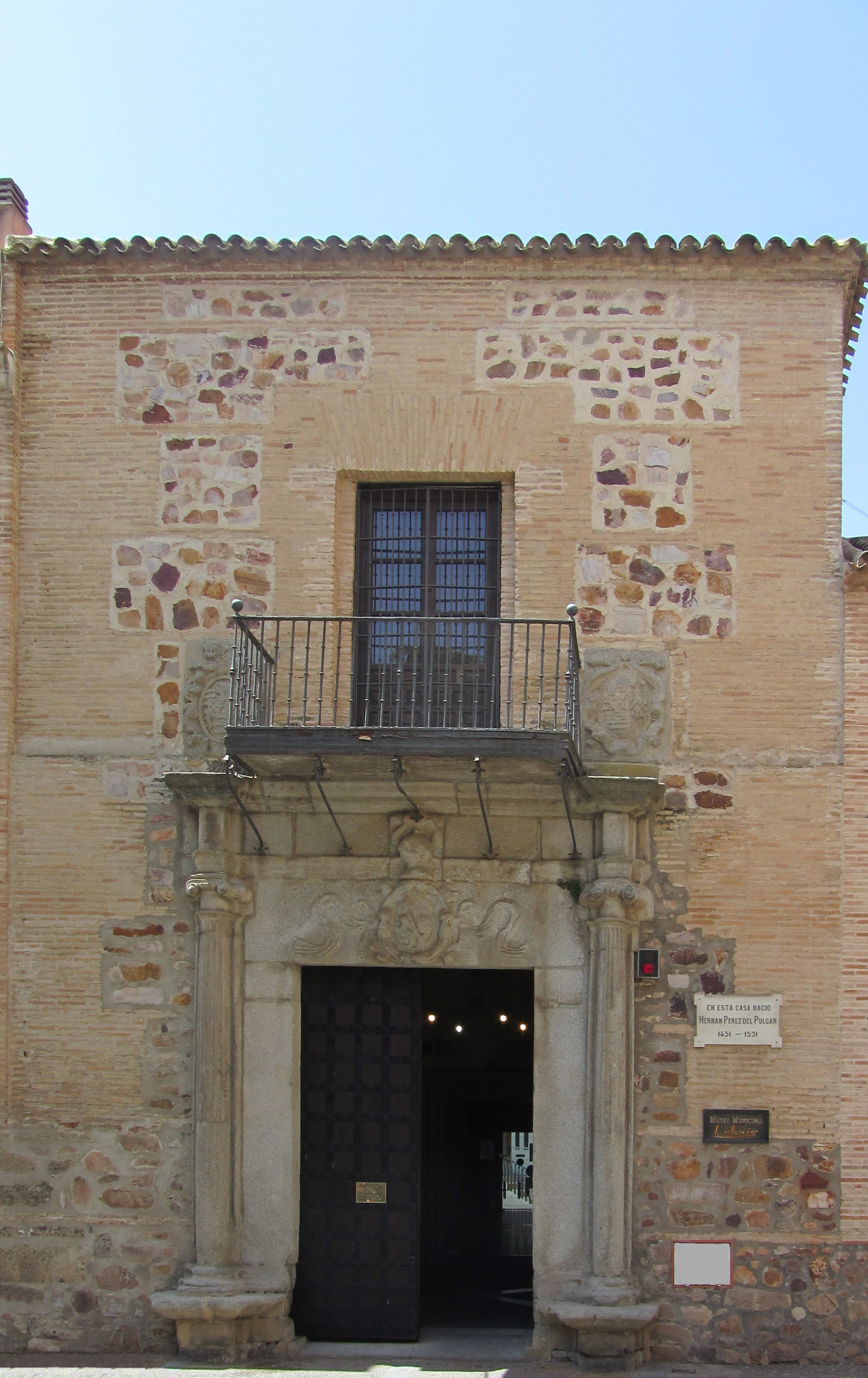 Casa natal de Hernán Pérez del Pulgar en Ciudad Real (España). Actual Museo Municipal J. Villaseñor, situado en la calle de los Reyes, nº 11.